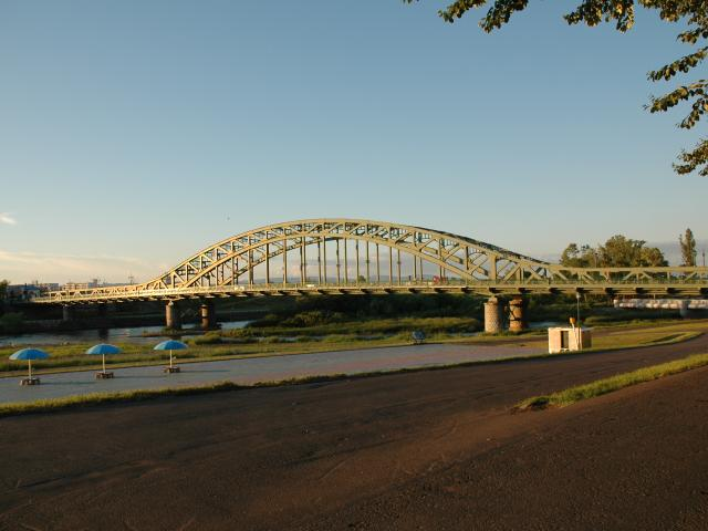 Asahibashi Bridge